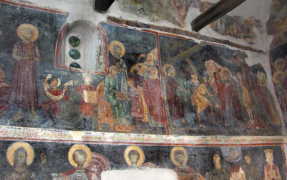 фреске у цркви свете Петке у Станичењу